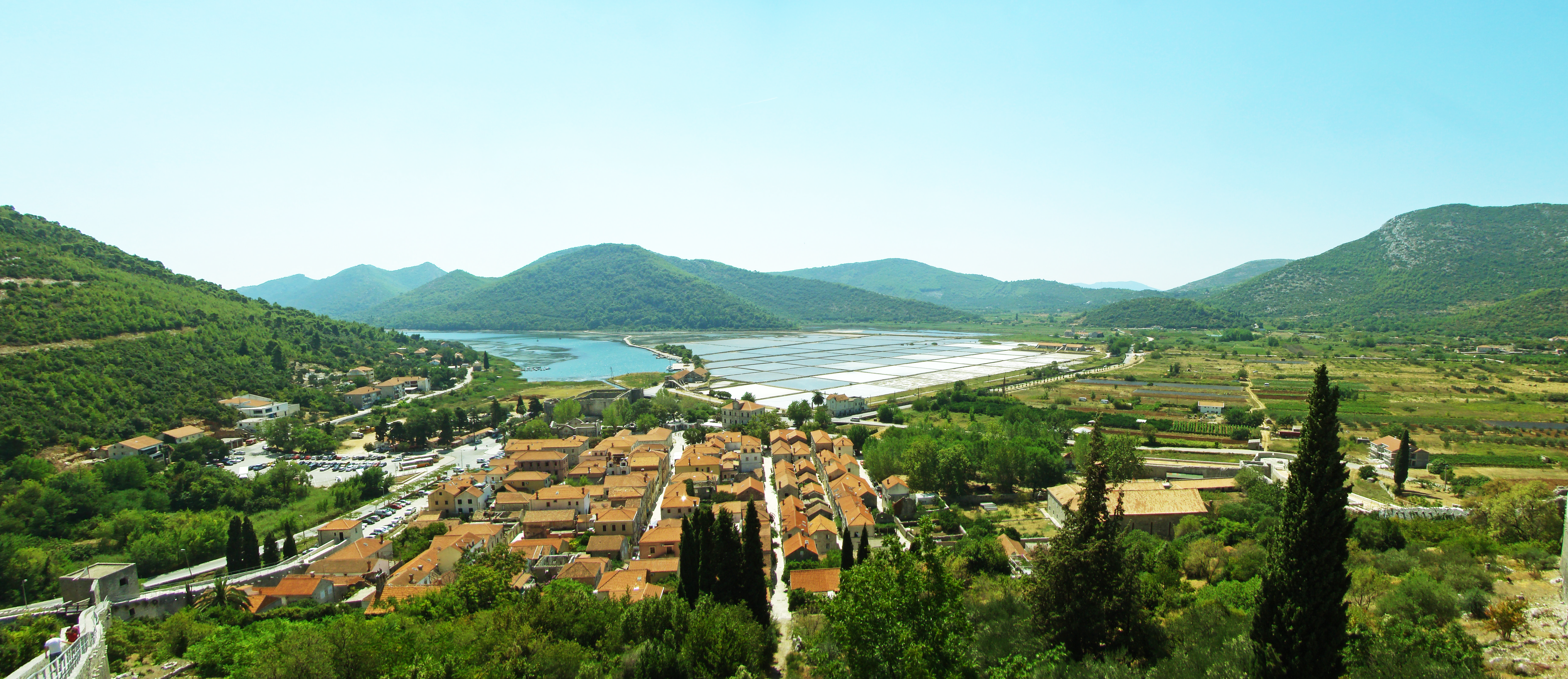 Panorama chorwackiego miasteczka Ston.